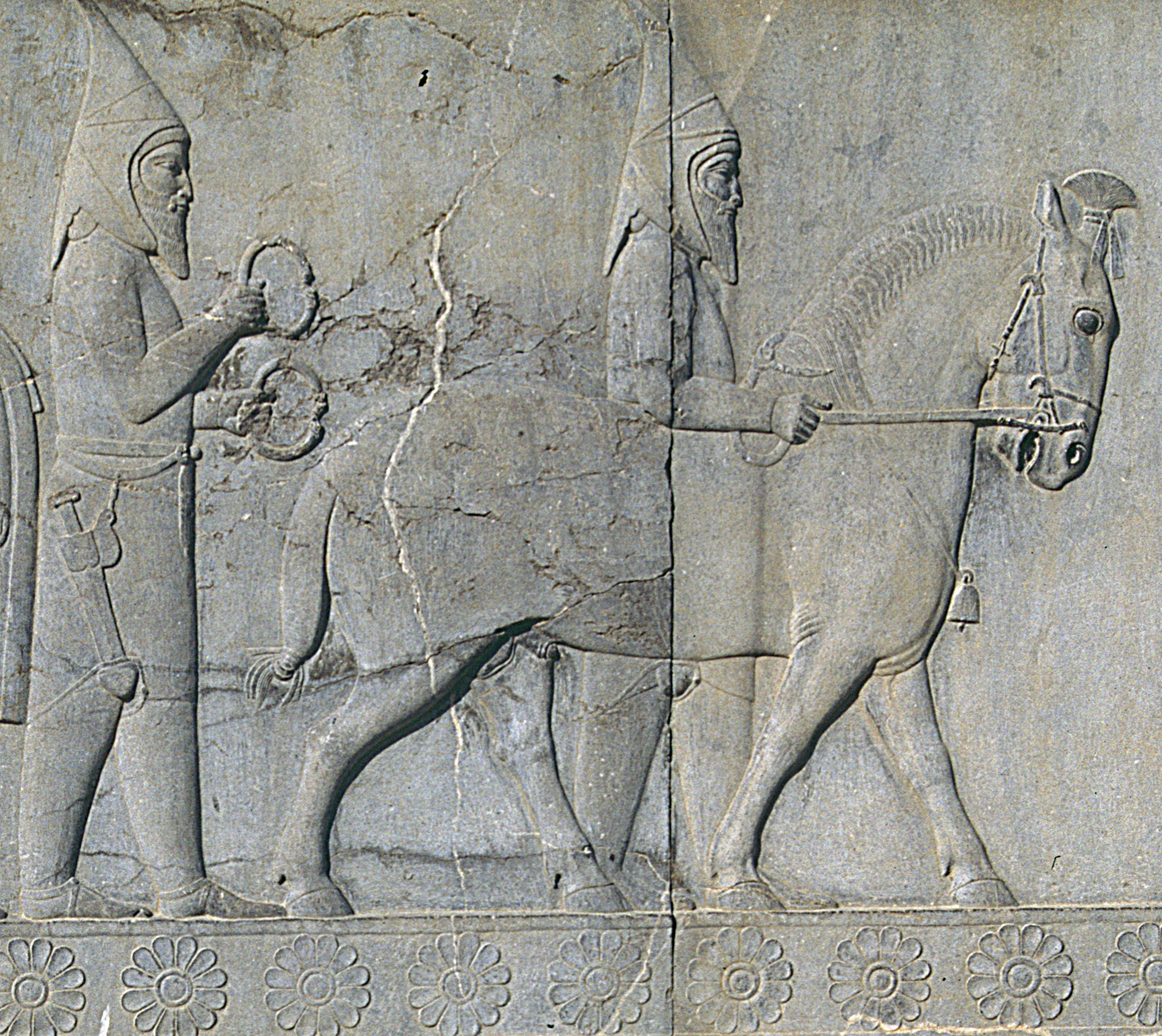 Persepolis: Relief der Apadana